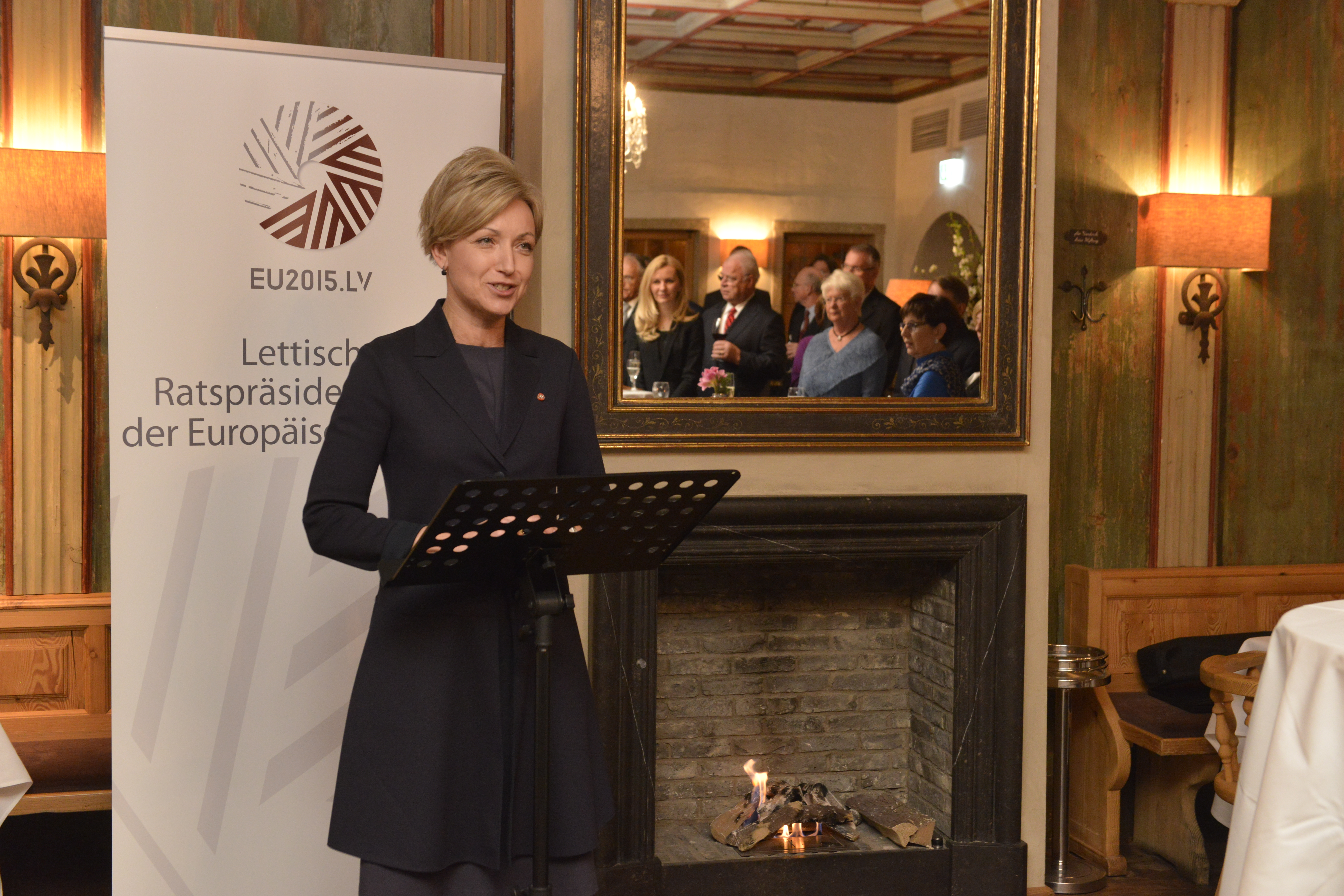 2015.gada 14.marts. Saeimas priekšsēdētājas biedre Inese Lībiņa-Egnere Minhenē tiekas ar Vācijas politiķiem un uzņēmējiem. Klātesošos uzrunā Latvijas vēstniece Vācijā Elita Kuzma. Foto: Juris Vīgulis, Saeimas Kanceleja